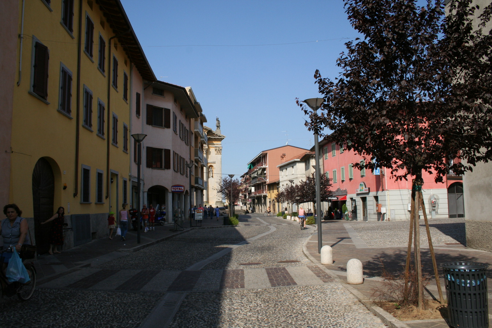 Suisio, Bergamo, panorama.